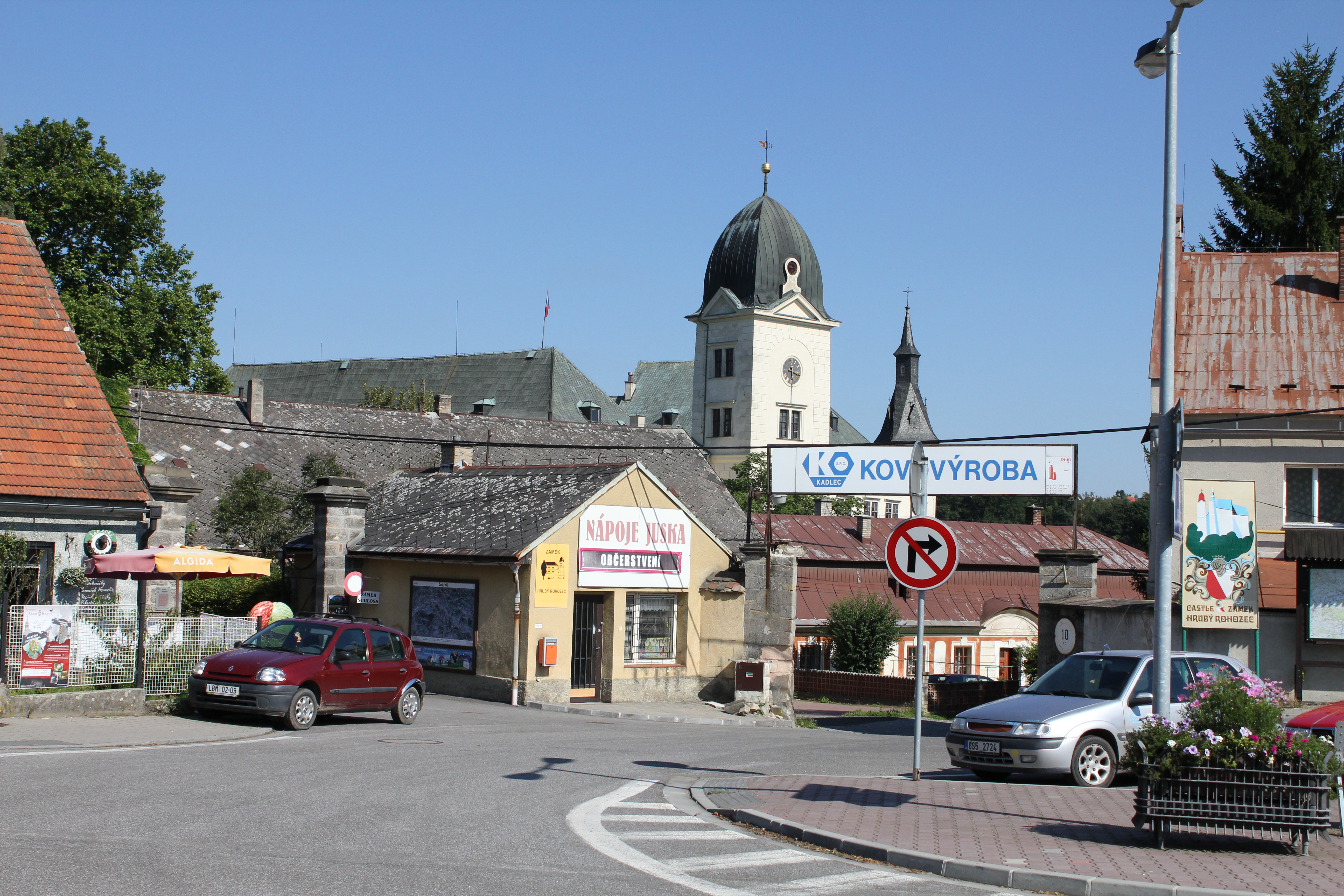 Hrubý Rohozec